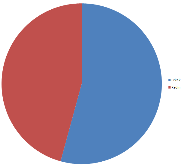 Kıbrıs'ın Taşpınar Köyünün 2006 yılı cinsiyet dağılımı grafiği